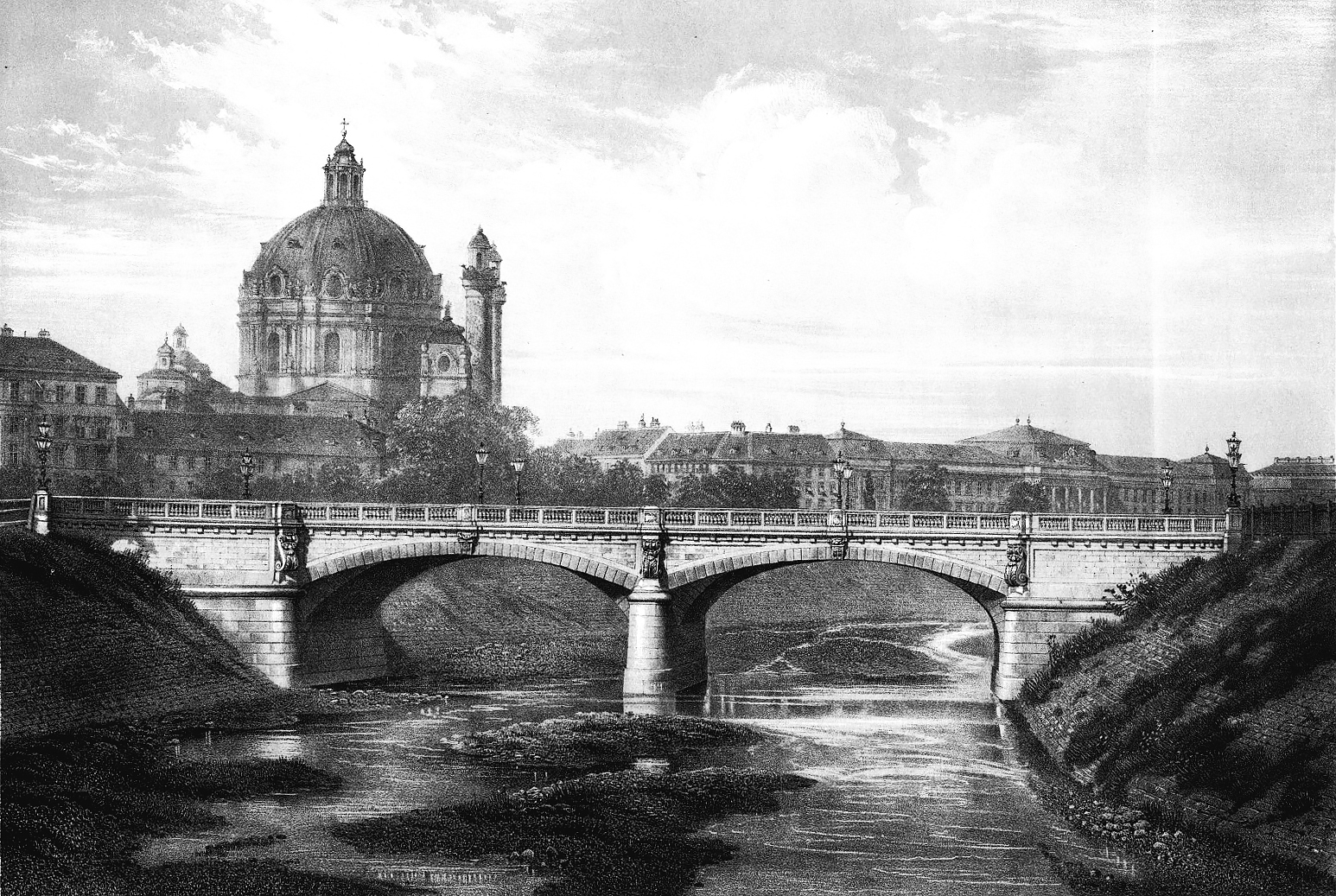 Wien, Schwarzenbergbrücke